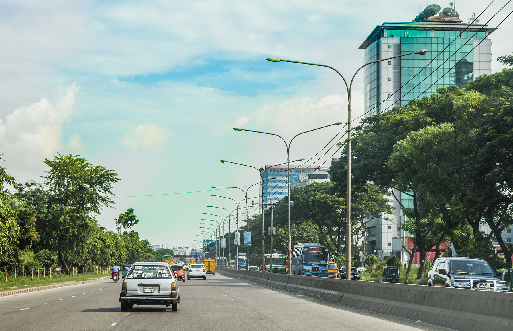 Dhaka